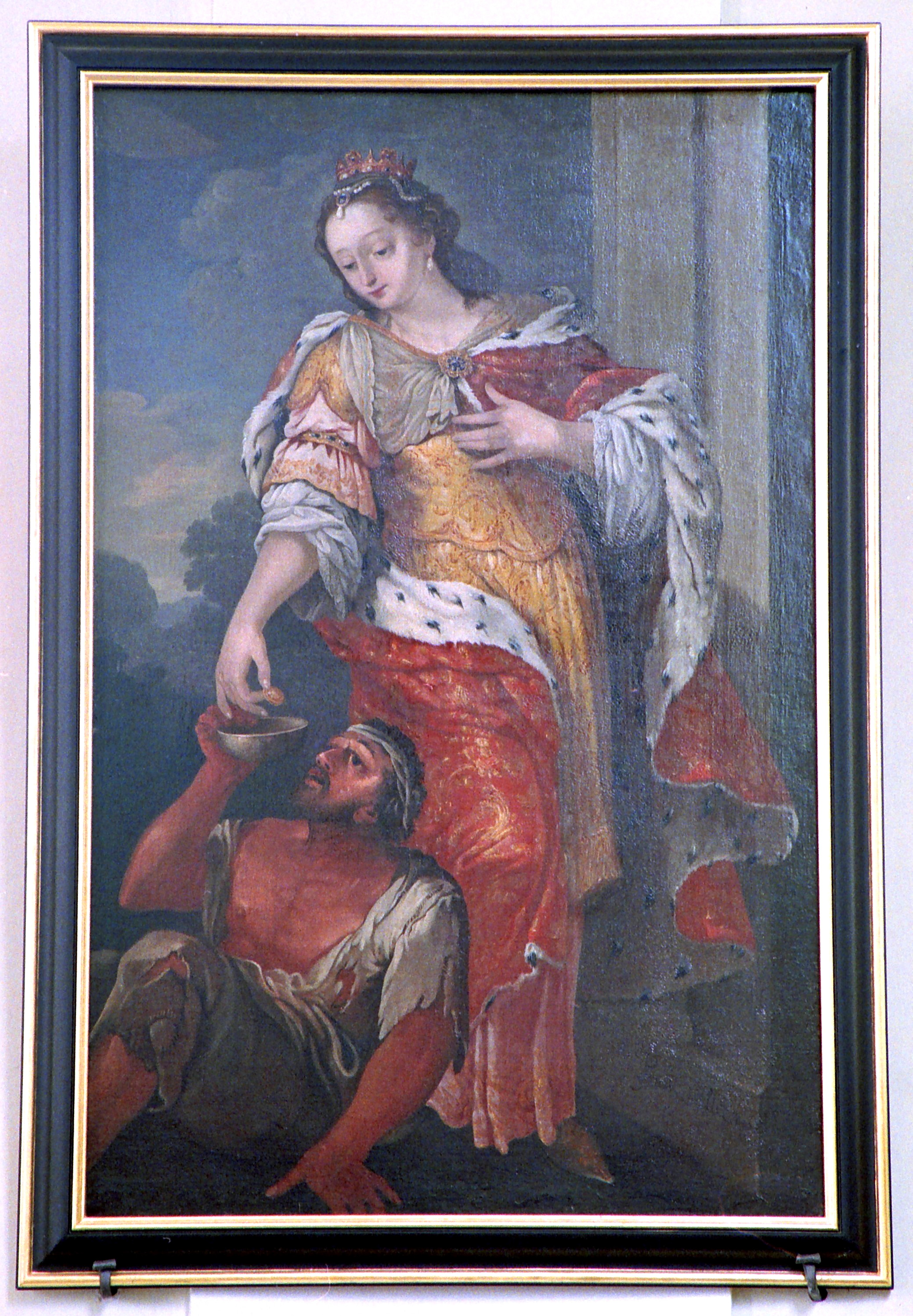 Hl. Elisabeth von Thüringentitle QS:P1476,de:"Hl. Elisabeth von Thüringen" label QS:Lde,"Hl. Elisabeth von Thüringen"